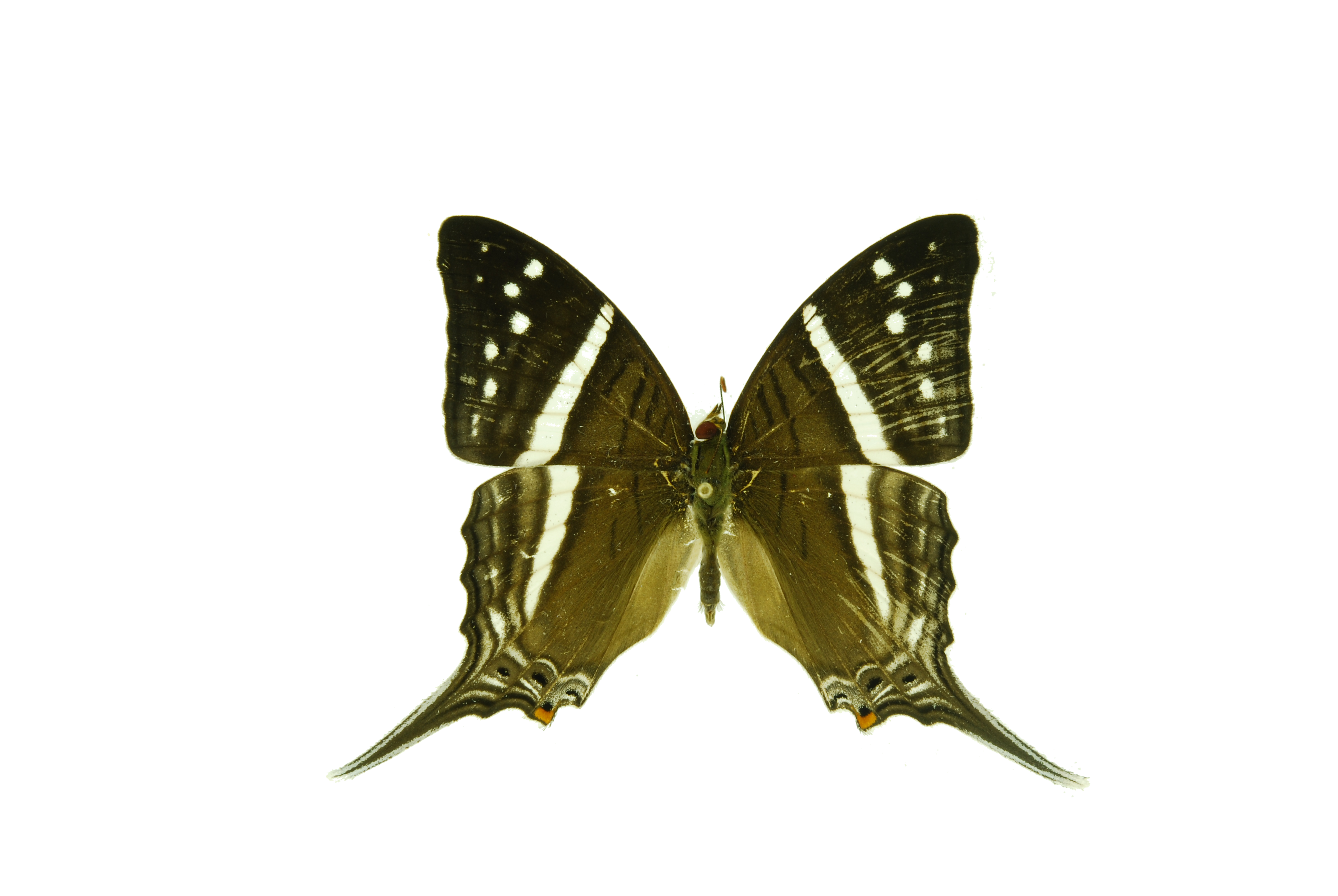 Ecuador